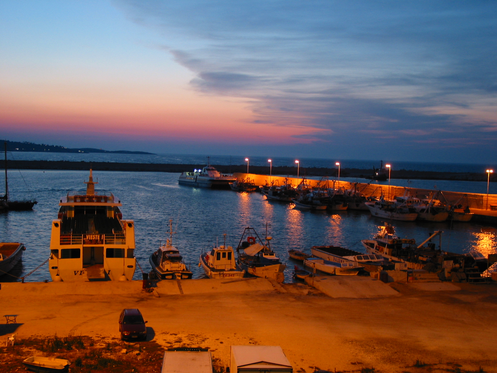 Vieste, Puglia, ItaliaVieste, Gargano